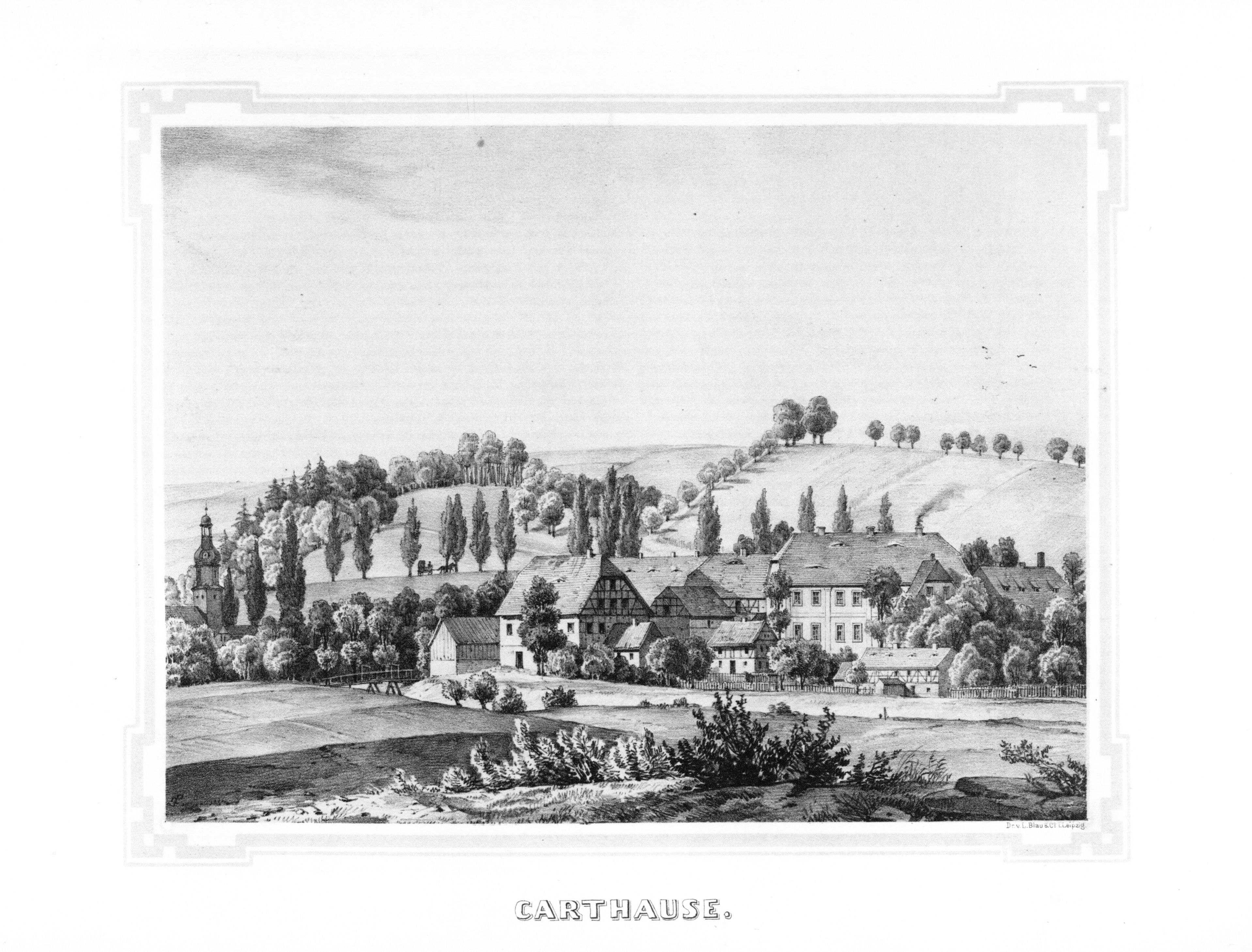 Carthause aus: Album der Rittergüter und Schlösser im Königreiche Sachsen Erzgebirgischer Kreis Section: IV